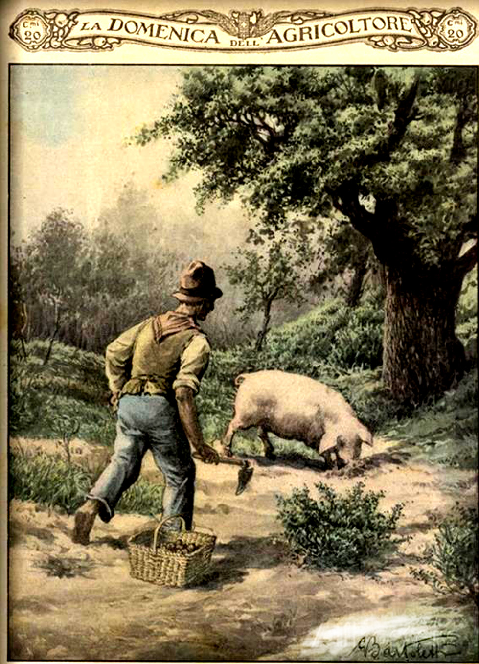 Szarvasgomba vadász a 19.században